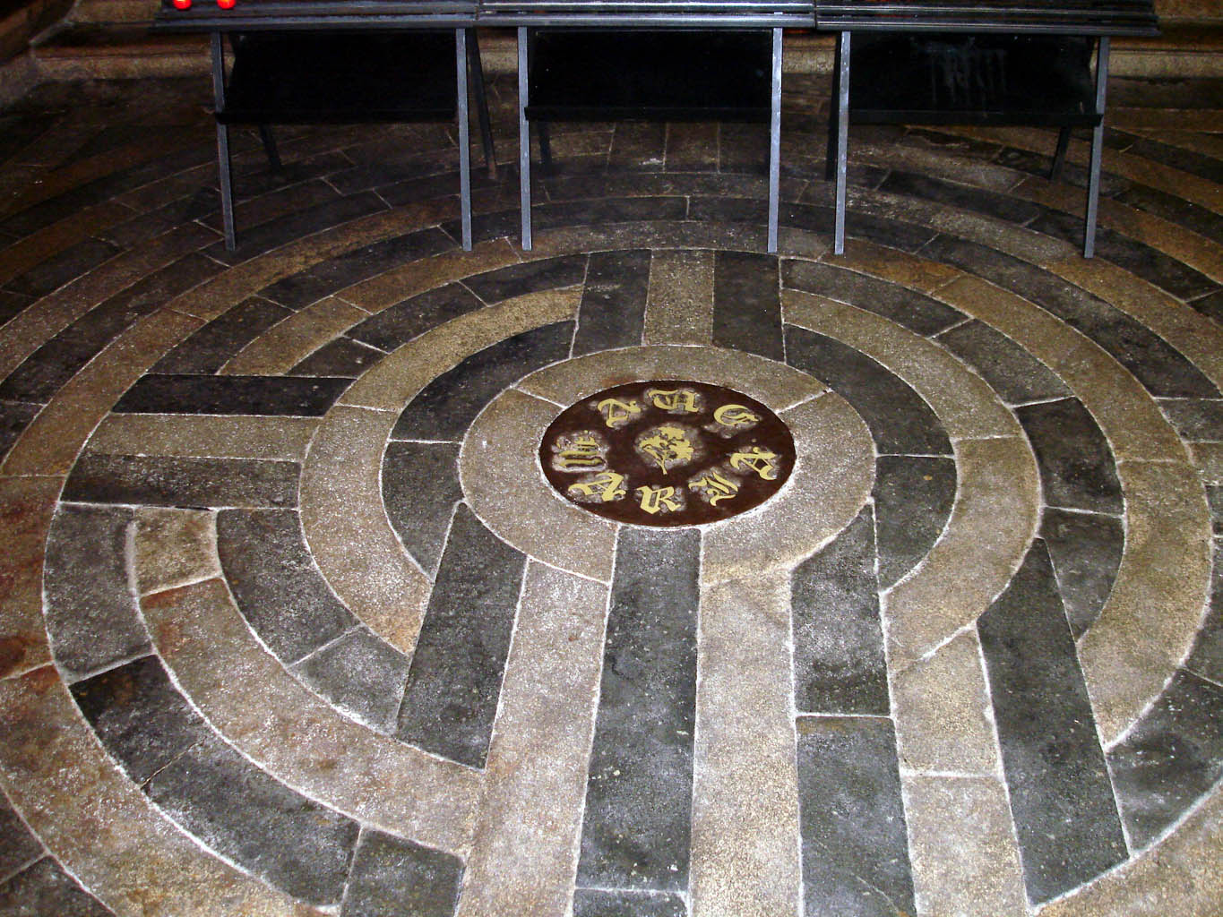 Labyrinthe, chapelle de la Vierge - Basilique de Guingamp (France).